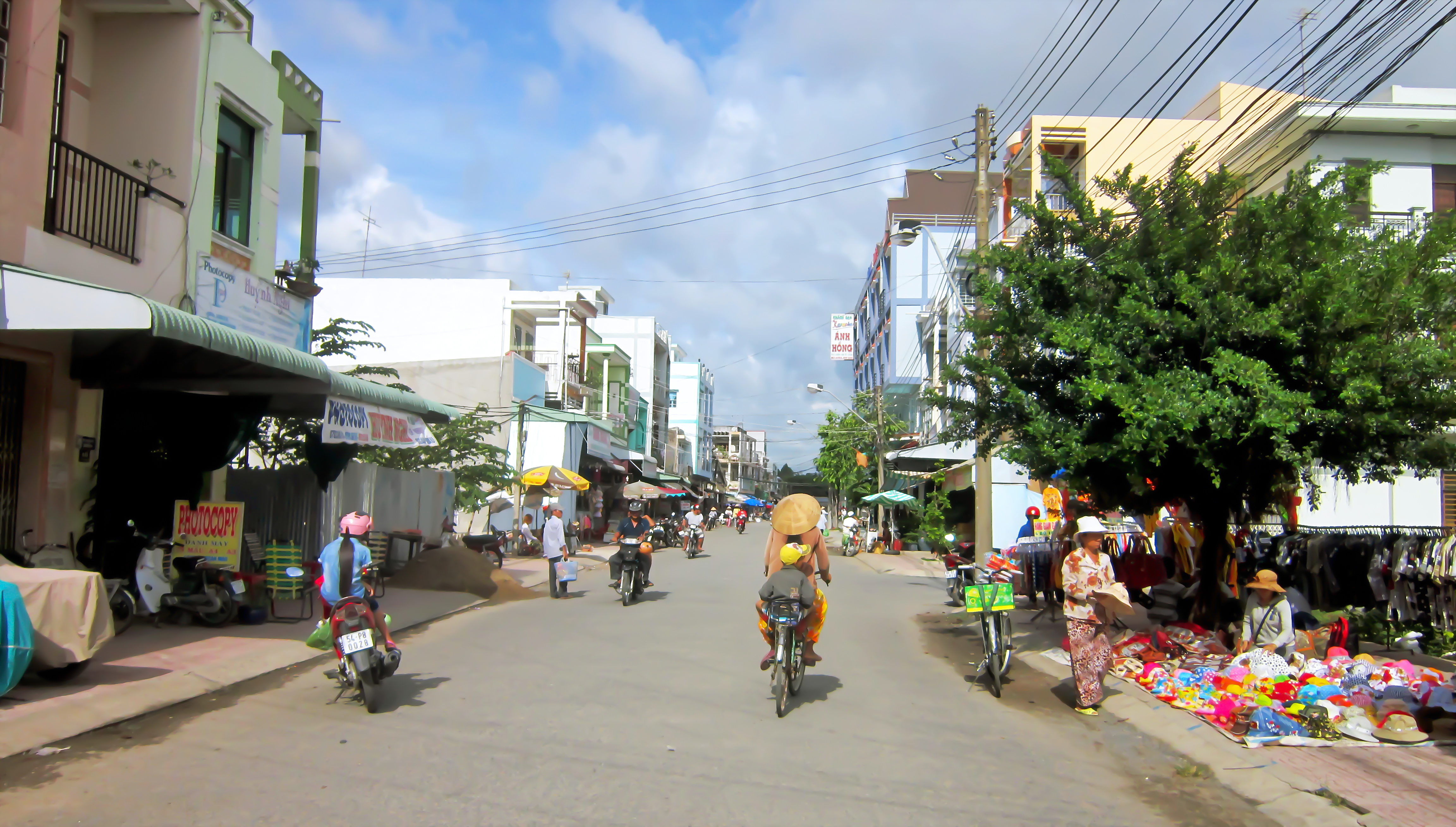 Một đường phố tại trung tâm thị trấn Cái Nhum, huyện Mang Thít, tỉnh Vĩnh Long, Việt Nam.